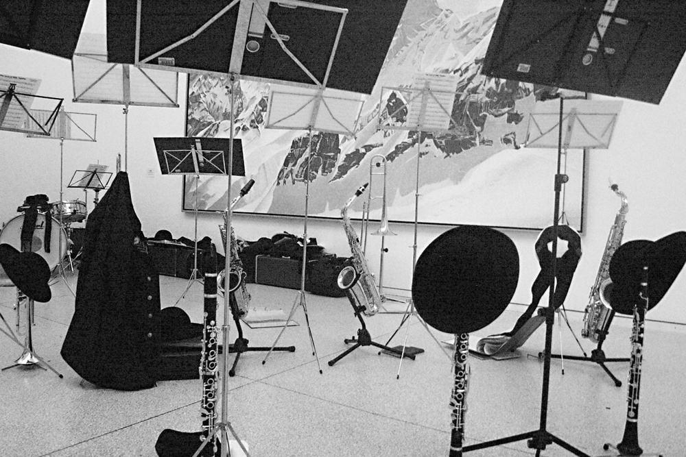 Bemerkung zu Berg/annotation on mountain, artistic intervention/künstlerische Intervention, Momentaufnahme, Heidelberger Kunstverein, 2002, Ruediger John